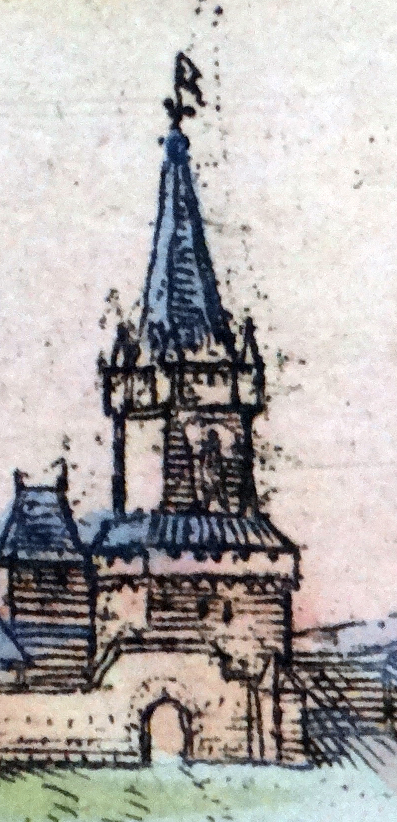 Neuturm, Worms. Detail aus: Georg Braun, Simon Novellanus und Franz Hogenberg: Beschreibung und Contrafactur der vornembster Stät der Welt. Heinrich von Ach, Köln 1574. Tafel zwischen den Seiten 35 und 36. Stadtarchiv Worms: Abt. 214 Nr. 1499.